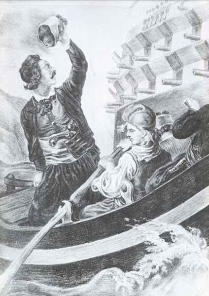 Ο Ιάκωβος Τομπάζης πυρπολεί το πρώτο τουρκικό δίκροτο. Λιθογραφία.